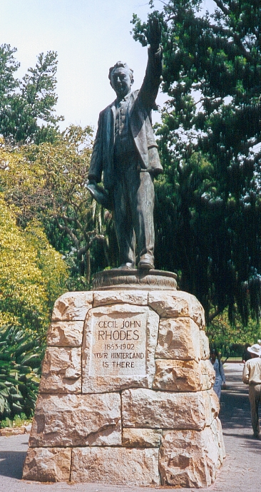 FC Georgio 1998 Statue de Cecil Rhodes au centre du Cap (Company's garden)